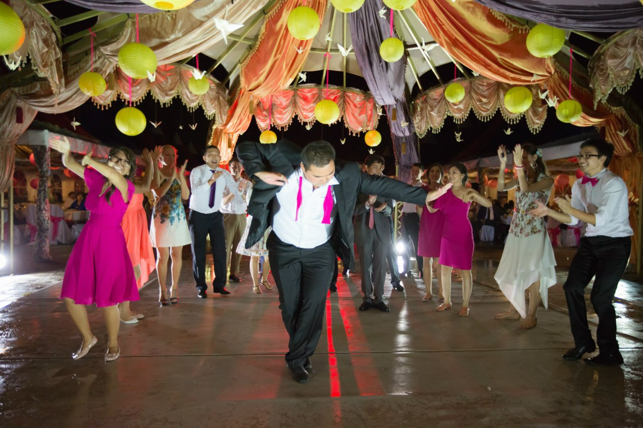 Танец кара жорга (Алма-Ата, Казахстан).